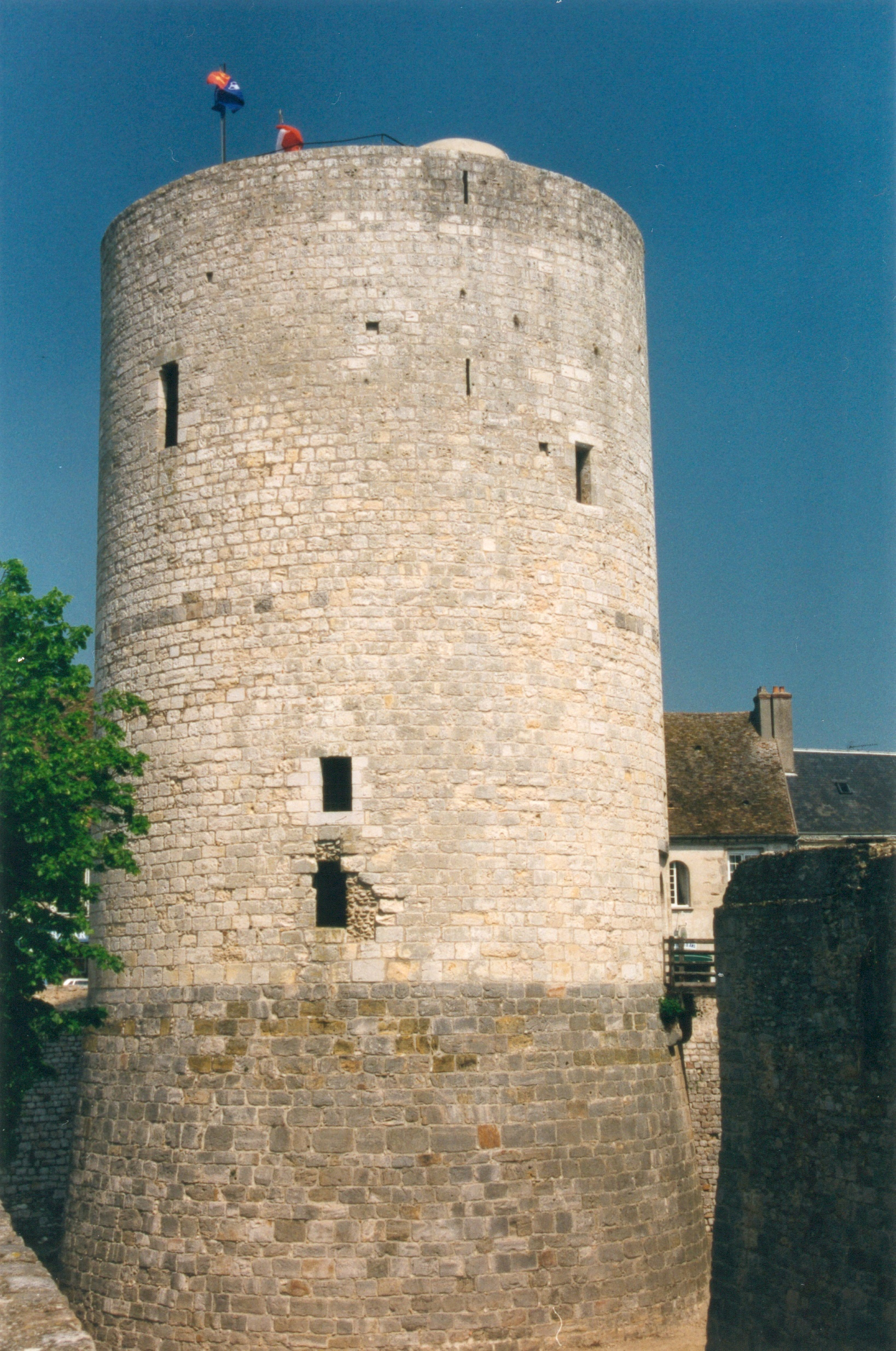 Donjon du château de Dourdan, France